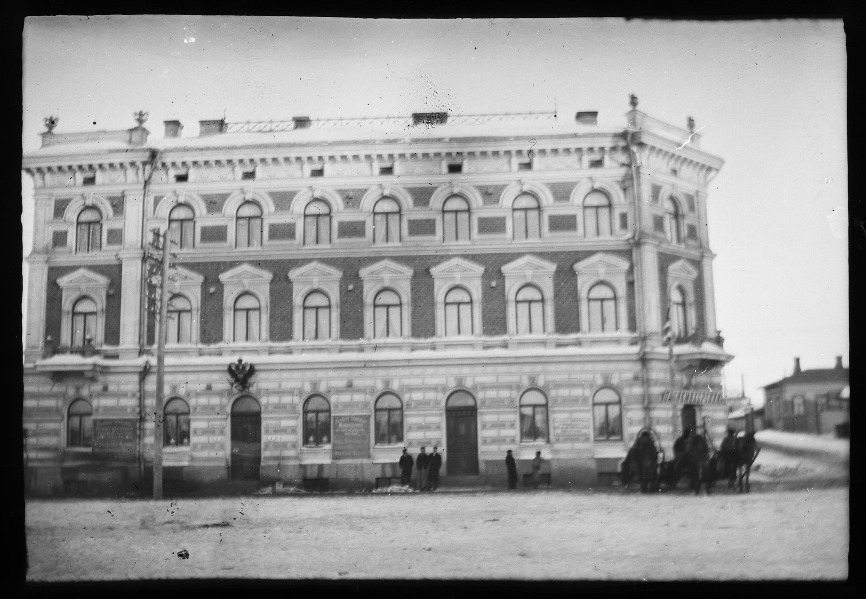 HS Ask 6.8.6 valokuvafilmi, selluloosanitraatti, leveys 90 mm, korkeus 60 mm Asiasanat: valokuvat, Viipurin kolmas apteekki, apteekintalo, Punaisenlähteentori, eksteriööri, kerrostalo, 3-kerroksinen kulmatalo, uusrenessanssityylinen, julkisivu Punaisenlähteentorille Hugo Simbergin jäljillä - Kansallisgalleria, Hugo Simbergin arkisto